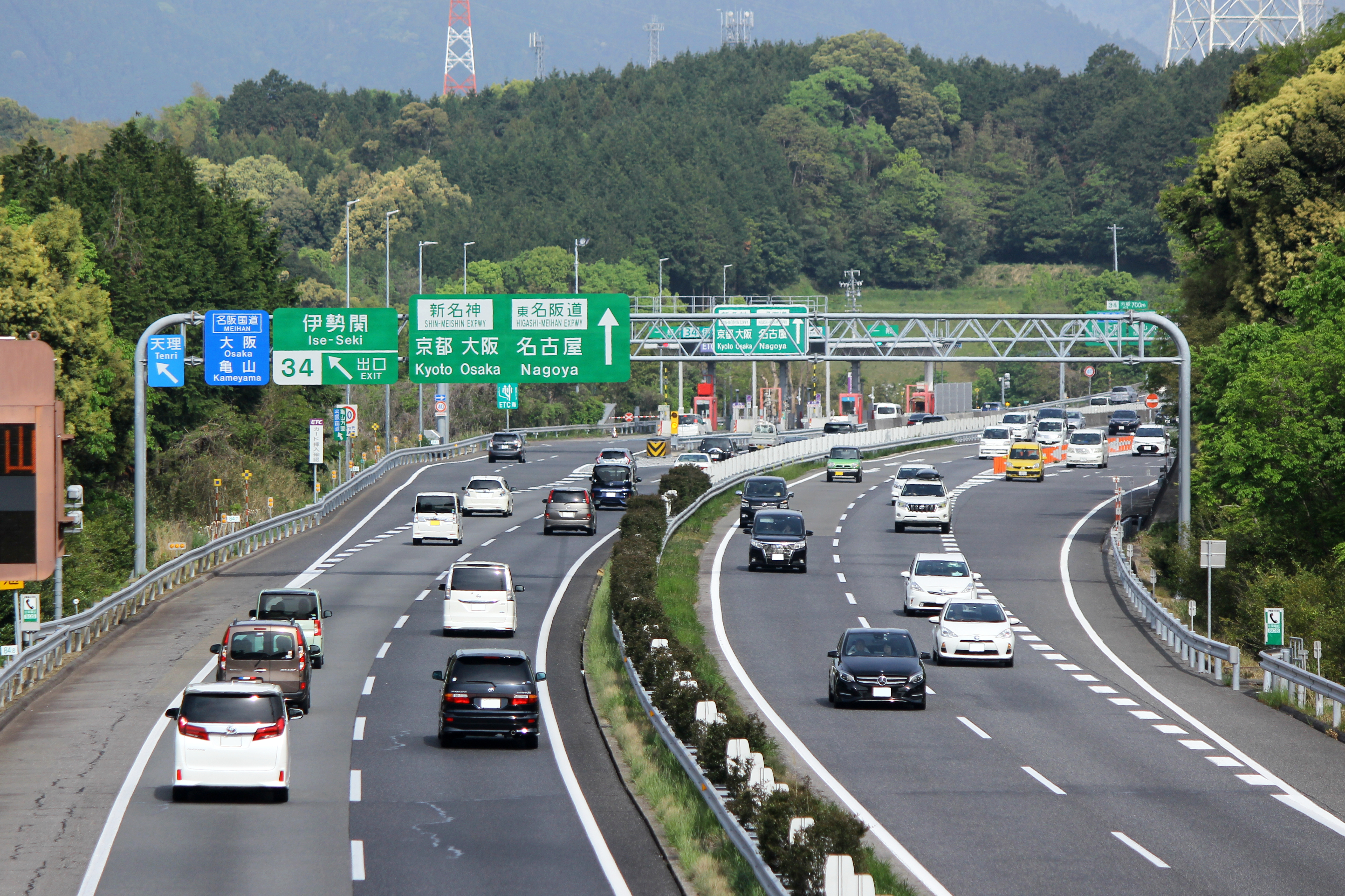 伊勢関インターチェンジ